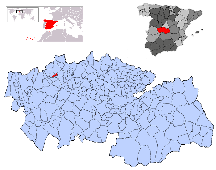 Marrupe en la provincia de Toledo